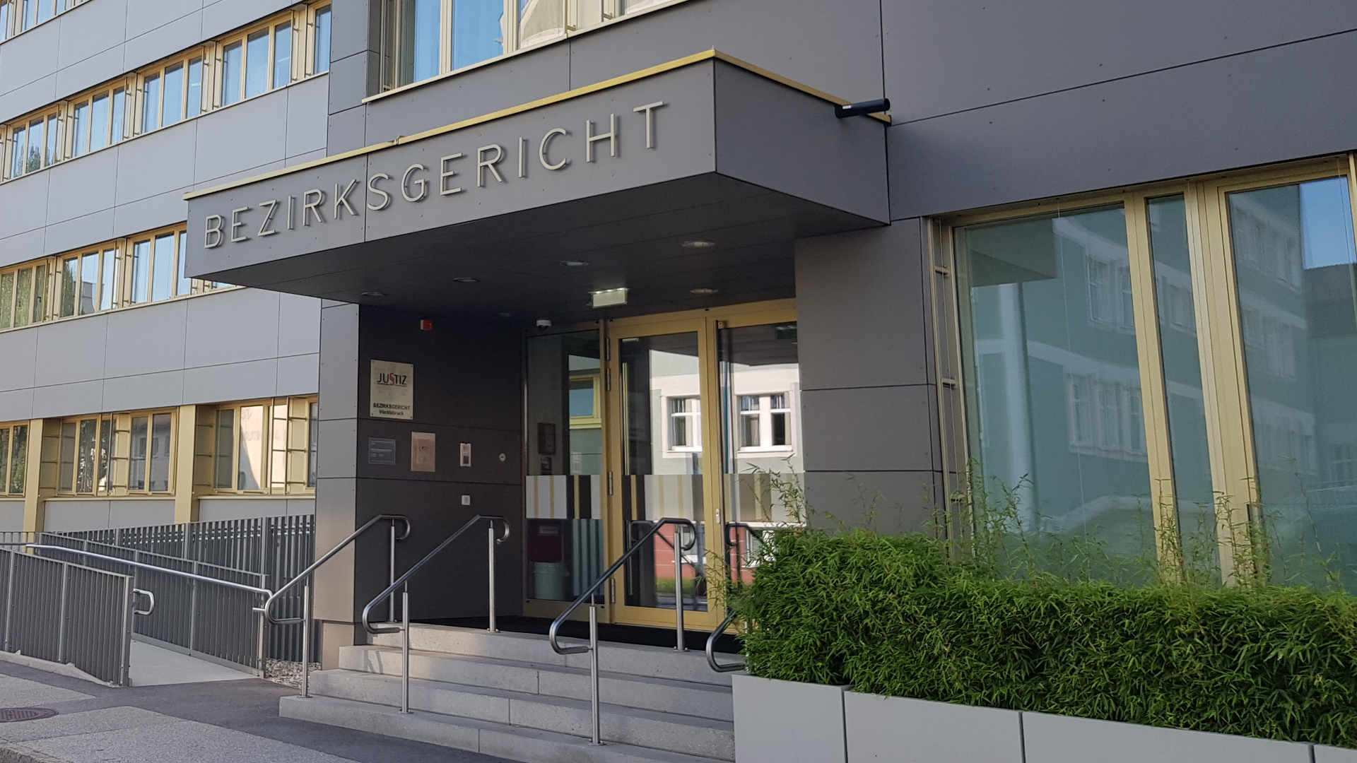 Bezirksgericht Vöcklabruck in der Ferdinand-Öttl-Straße